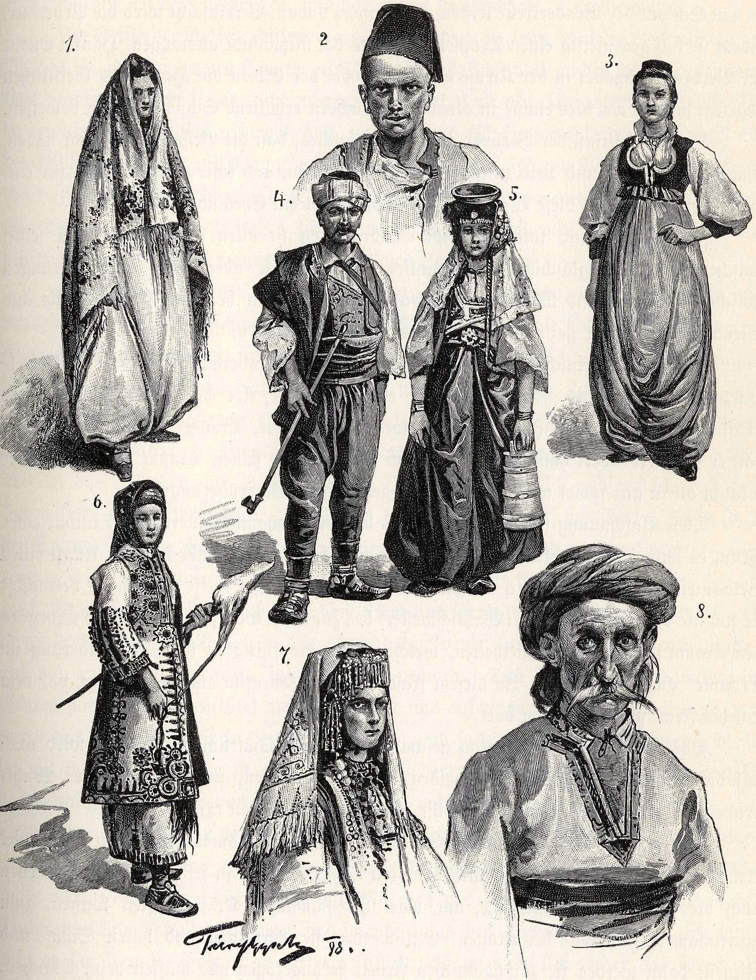 Volkstrachten aus Ober- und Mittelbosnien